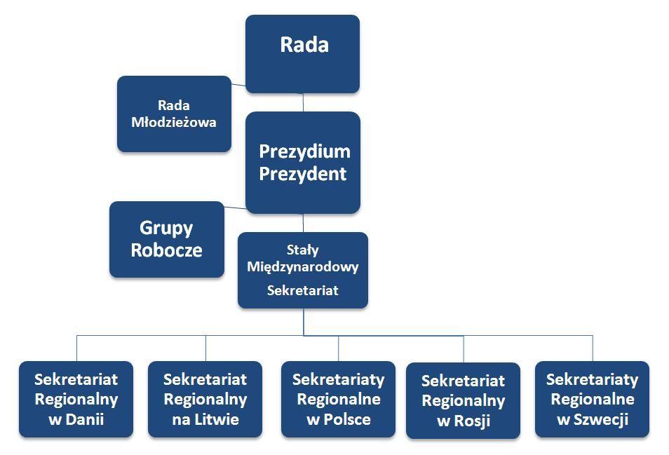 Strutkura organizacyjna Euroregionu Bałtyk przed reformą w roku 2010.